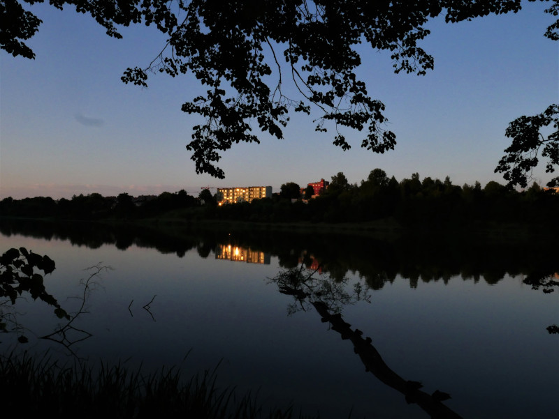 widok na nową część alei filozofów